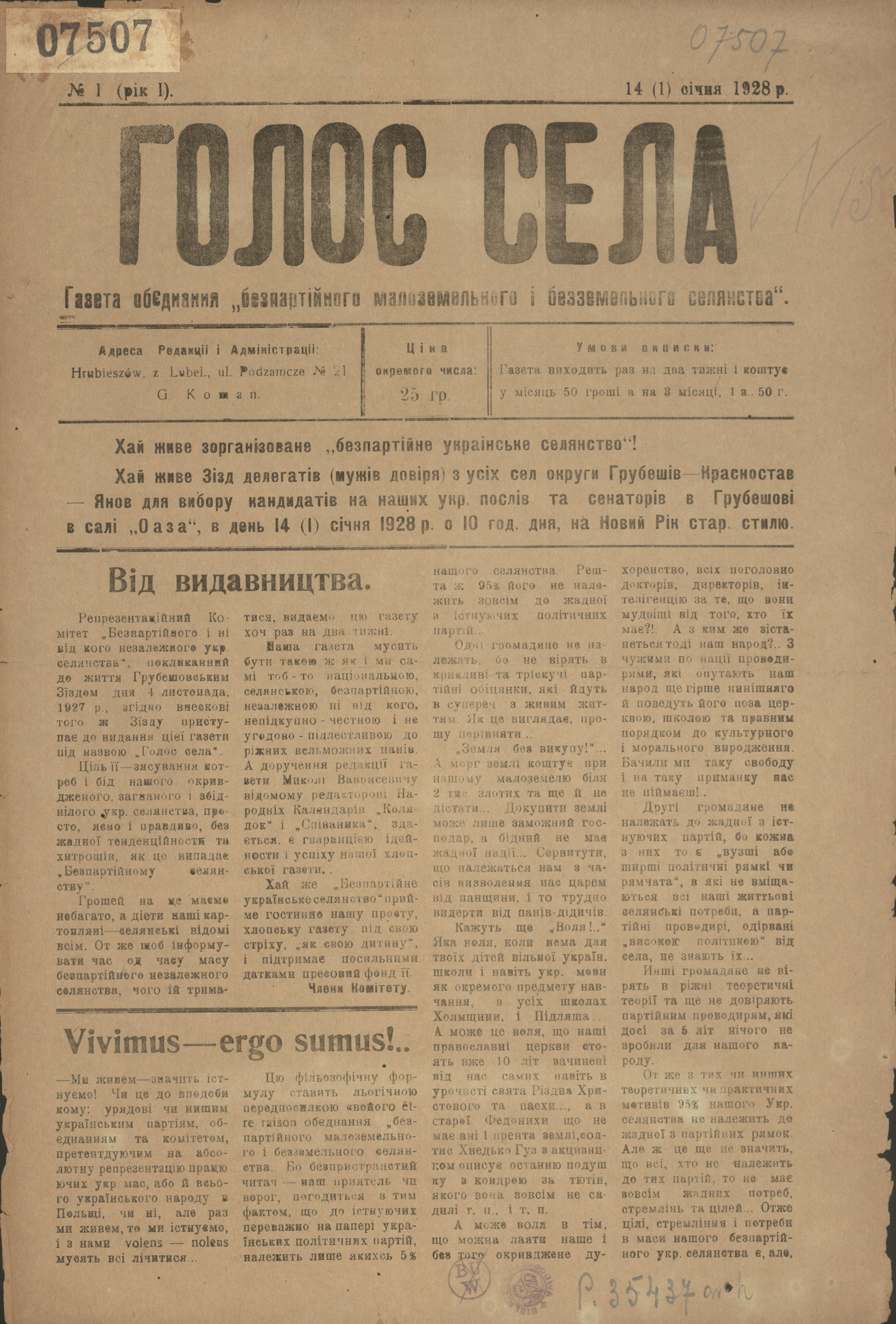 Український часопис "Голос Села" з Грубешова.